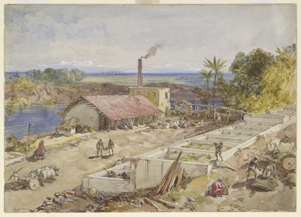 Chromolithograph, "Indigo factory, Bengal," (1867) from William Simpson's 'India: Ancient and Modern'. Bengal was the world's largest producer of indigo in the 19th century.